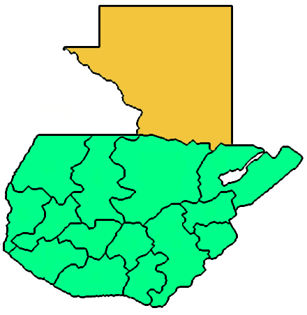 Mappa del vicariato apostolico di El Petén, in Guatemala. Lavoro personale eseguito a partire da questa immagine di Commons. Fonte per i confini delle diocesi